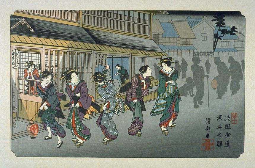 Fukaya on the Kisokaido, ukiyo-e prints by Keisai Eisen